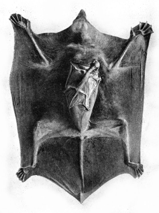 Een Cobego is een zgn vliegende hond (Cynocephalus) of kat.